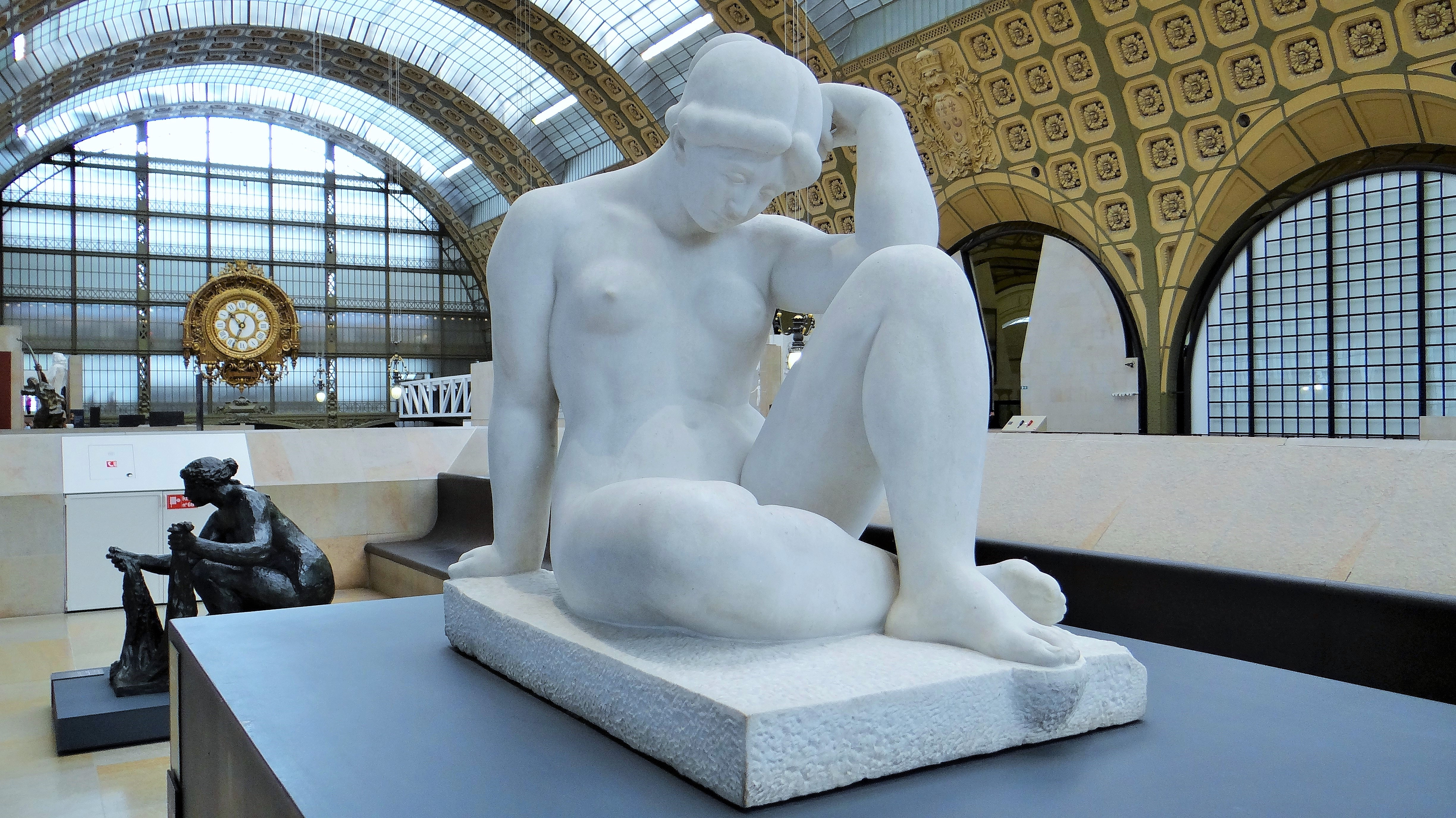 Méditerranée dit aussi La Pensée, entre 1923 et 1927, d'après un plâtre exposé en 1905, marbre, Aristide Maillol (1)